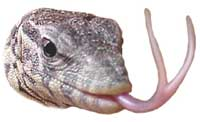 (en) Monitor lizards' forked tongue. (fr) La langue Bifide des Varans.